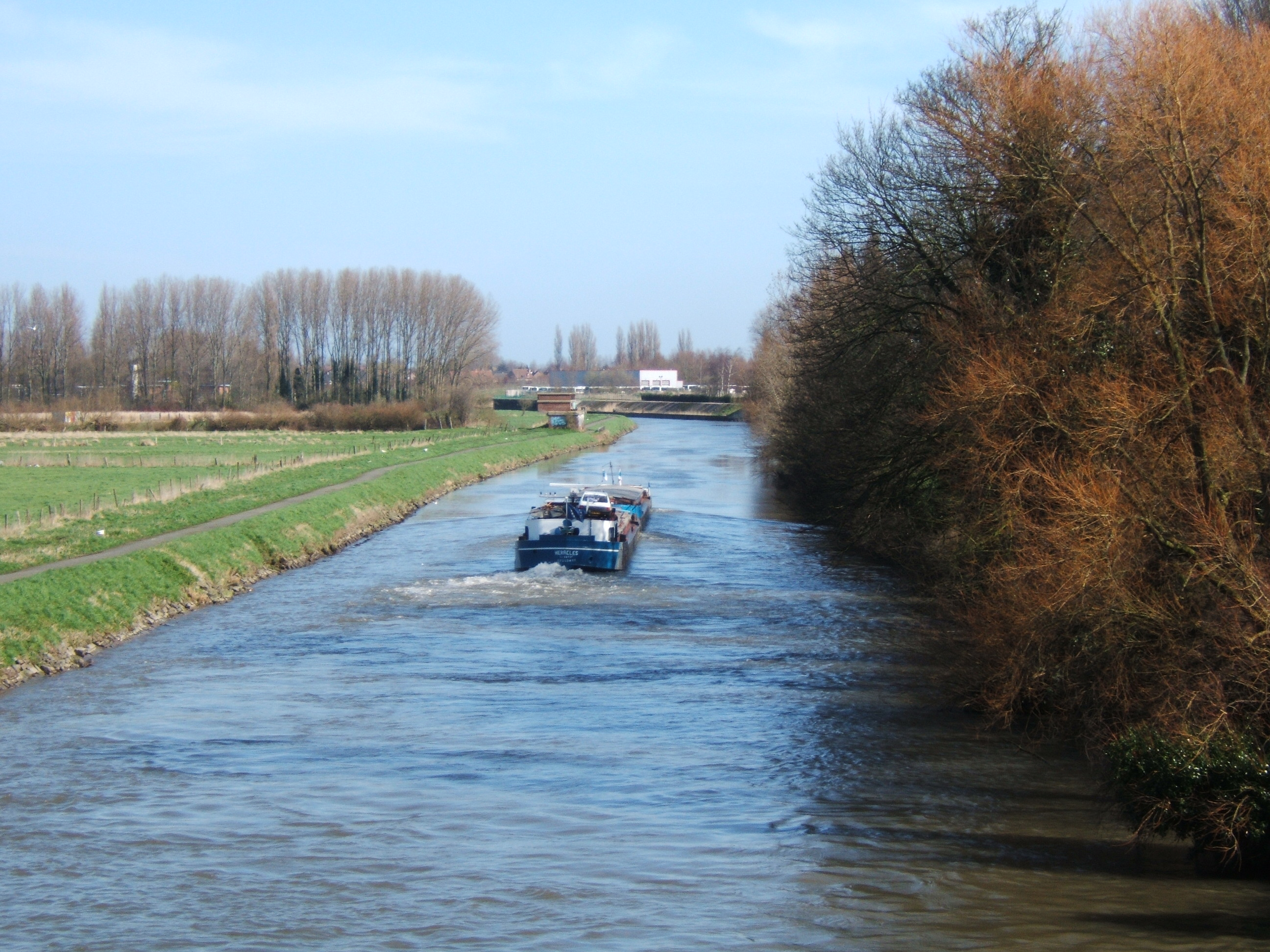 De grensrivier Leie tussen Frankrijk en België bij Komen